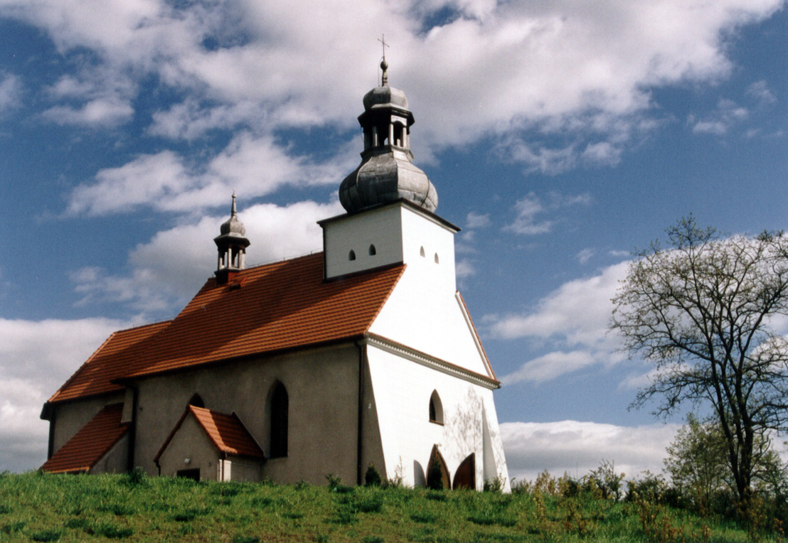 Chomiąża Szlachecka, kościół z XIX wieku